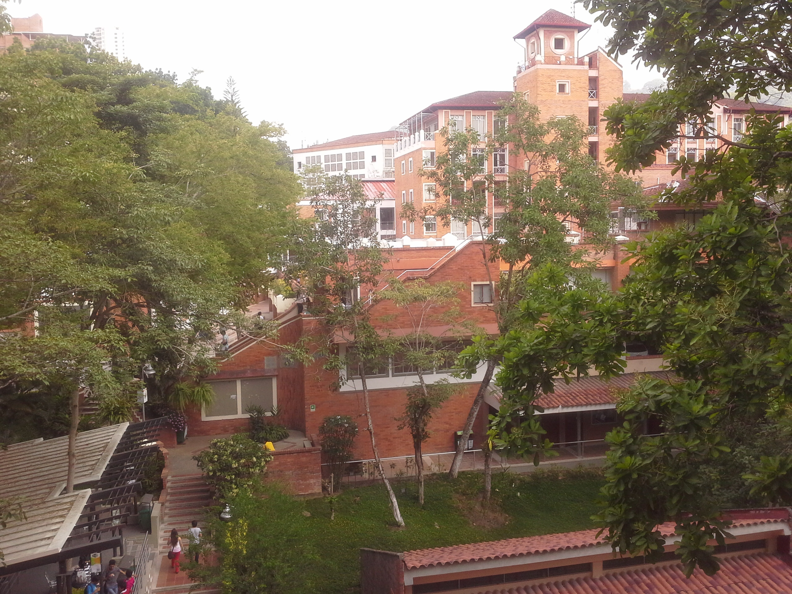 Vista del campus el jardín.